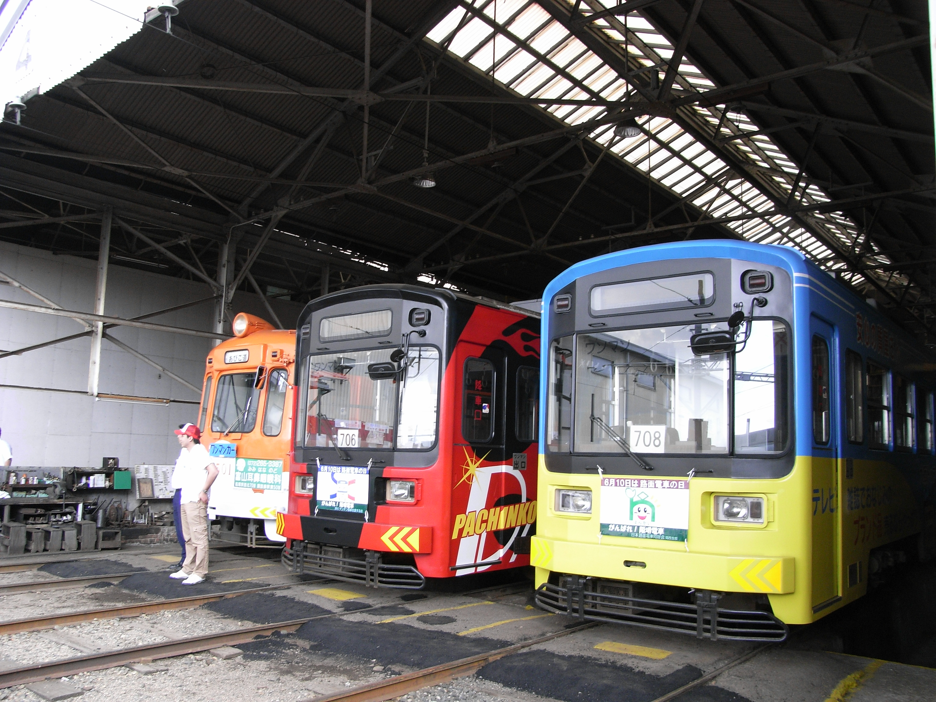 阪堺電車まつり